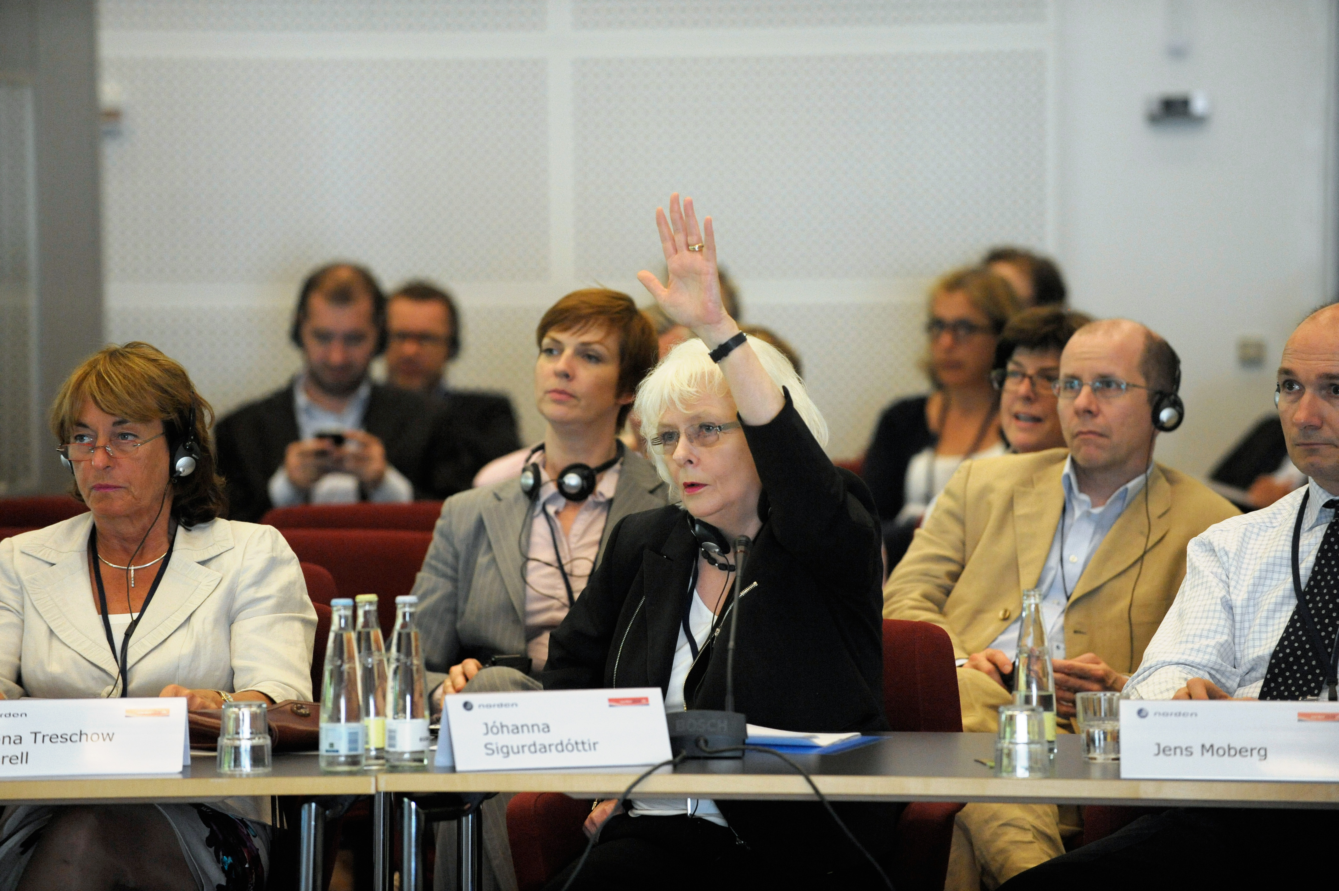 Jóhanna Sigurðardóttir, Islands statsminister begär ordet vid Nordiskt globaliseringsforum 2010.